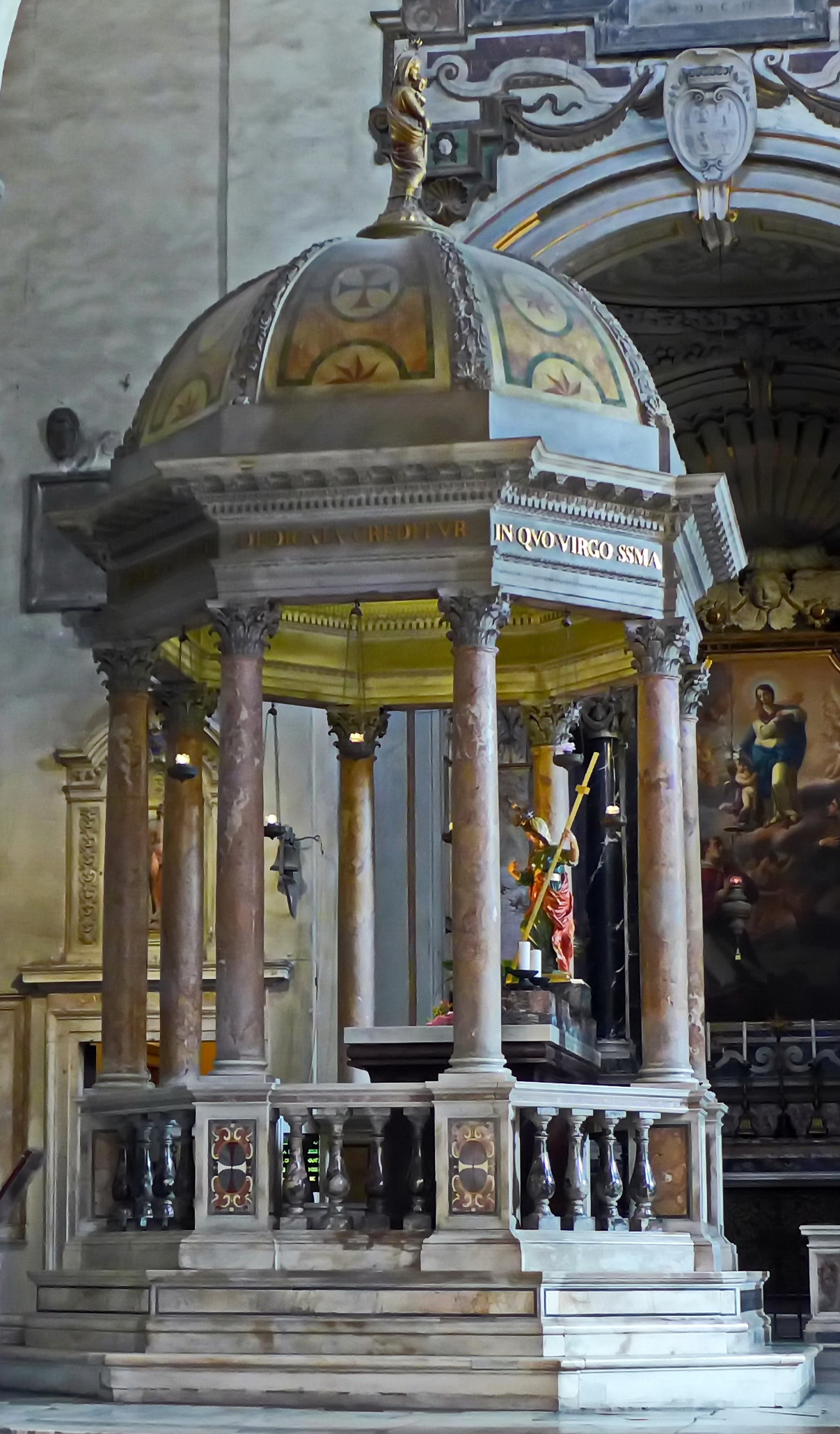 Santa Maria in Aracoeli (Rom) Aedikula in der Kapelle der Heiligen Helena